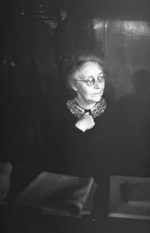 Ministerpräsidenten-Konferenz der Länder der 3 Westzonen Deutschlands auf dem Berghotel Rittersturz in Koblenz (Louise Schroeder) 8.-10.7.1948